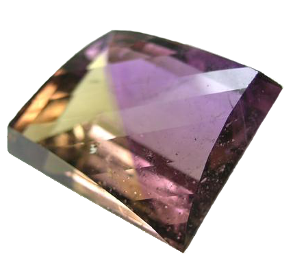 Bolivinita o ametrino originaria de Bolivia.